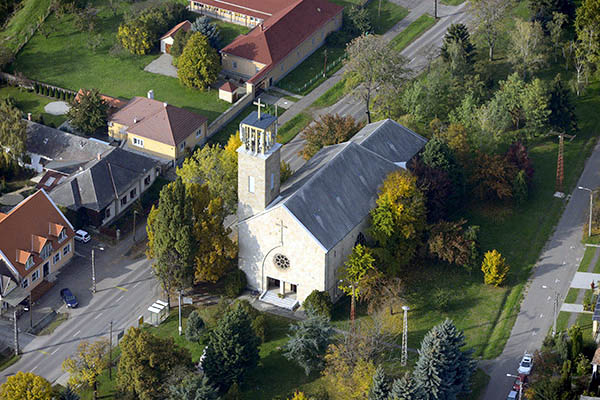 Maklár légi fotó